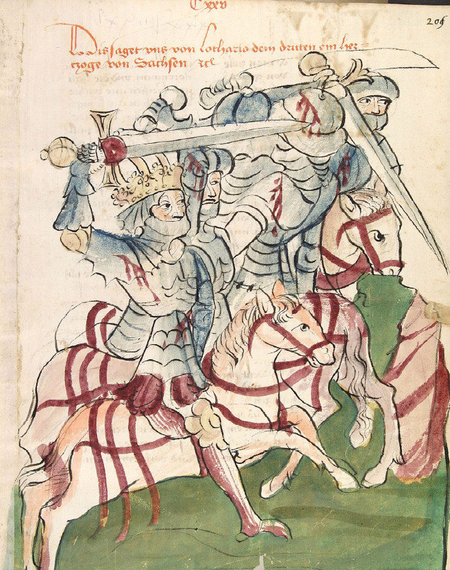 Kaiser Lothar III. kämpft in der Schlacht von Kulm (Chlumec) gegen die Böhmen unbekannter Künstler aus der Werkstatt des Diebold Lauber, um 1450 aus Historia septem sapientum, deutsch & Martinus Oppaviensis, Chronicon pontificum et imperatorum, deutsch Die Illustration bezieht sich auf die Schlacht von Kulm (Chlumec) 1126, in der Kaiser Lothar III. von Süpplingenburg den Truppen Herzog Sobeslaw I. von Böhmen unterlag. Der Kaiser und seine Ritter kämpfen mit erhobenen Schwertern und zu Pferde in der Schlacht Mann gegen Mann gegen die ebenfalls berittenen Böhmen.